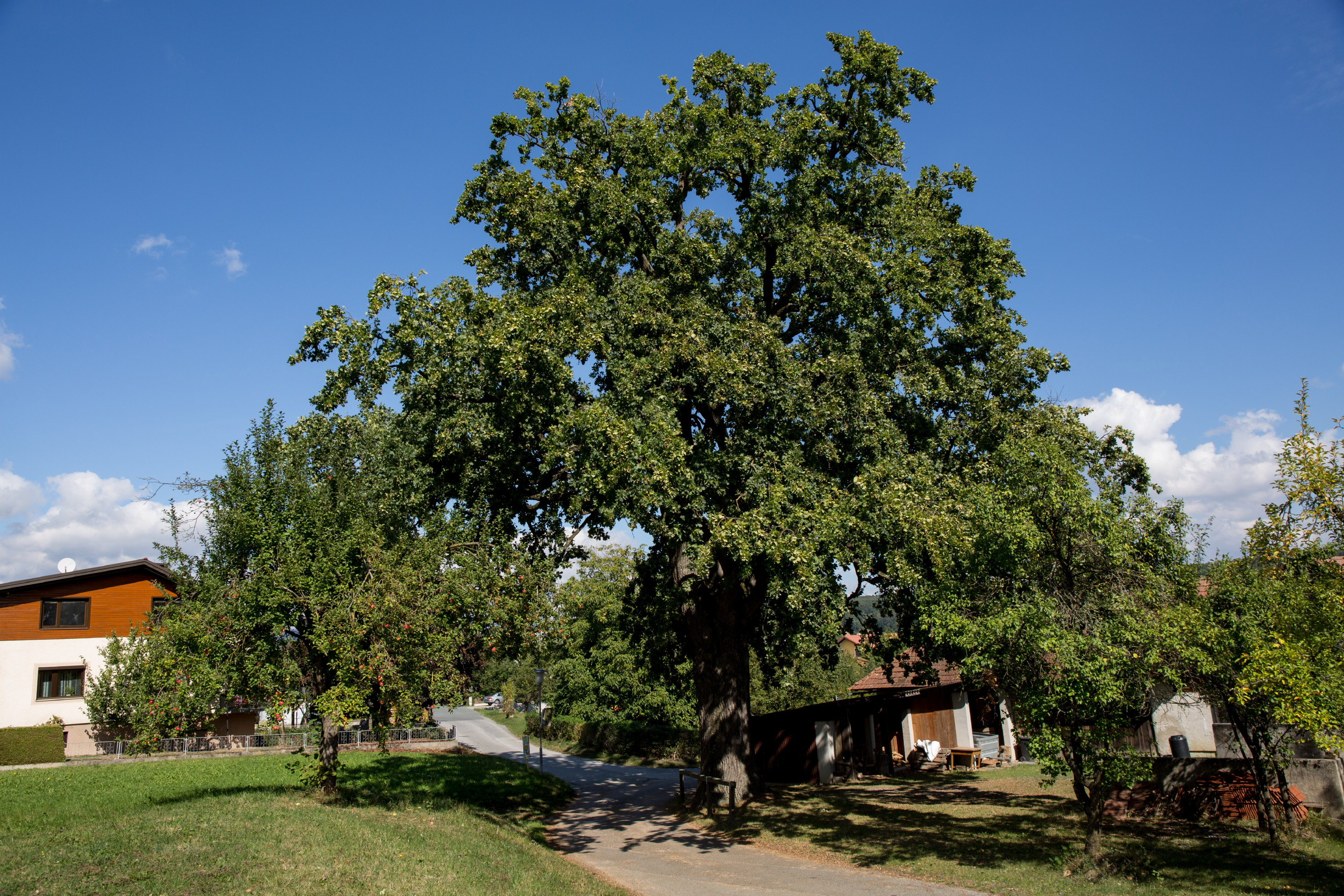 Stieleiche (Quercus robur) This media shows the natural monument in Styria with the ID 686.